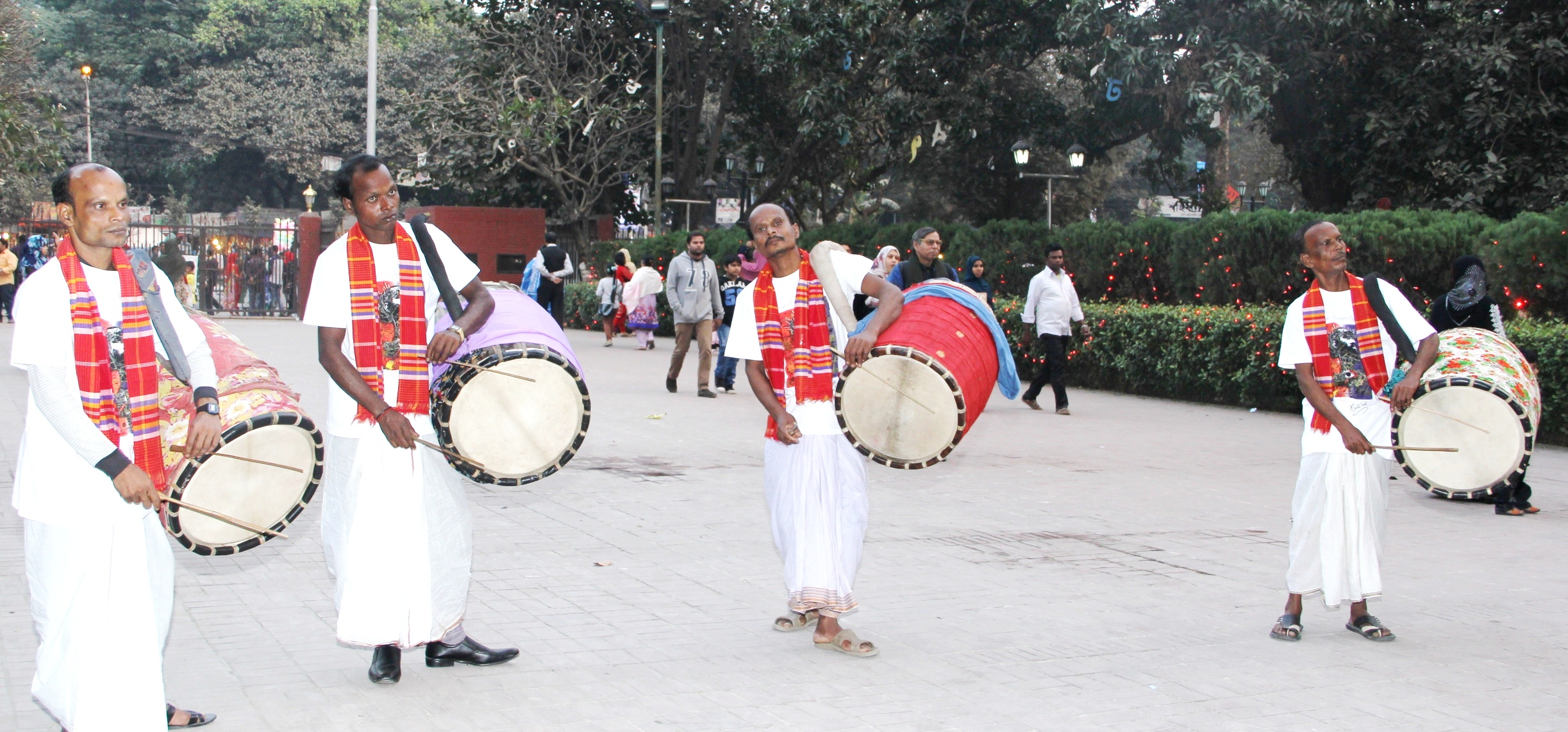 কয়েকজন ঢুলি ঢোল বাজাচ্ছে